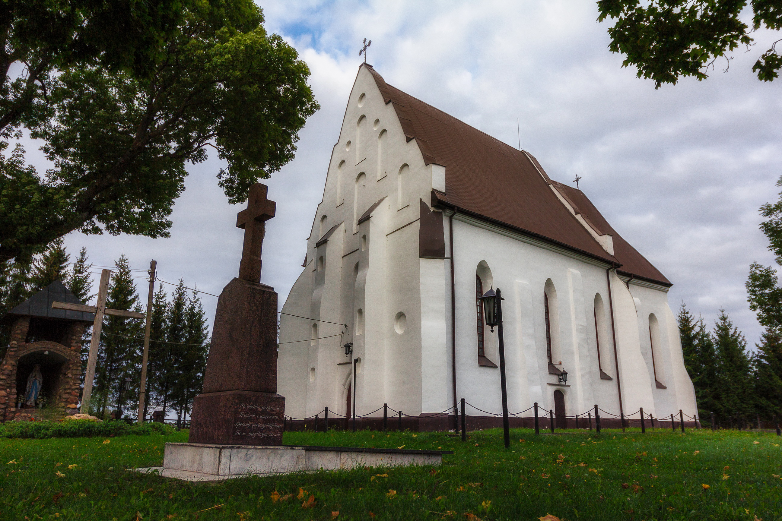 Беларуская (тарашкевіца): Троіцкі касьцёл. в. Ішкальдзь